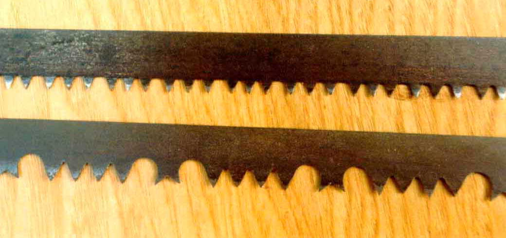 Dentures des scies à buches Auteur : Taveneaux 8 février 2006 à 14:07 (CET)